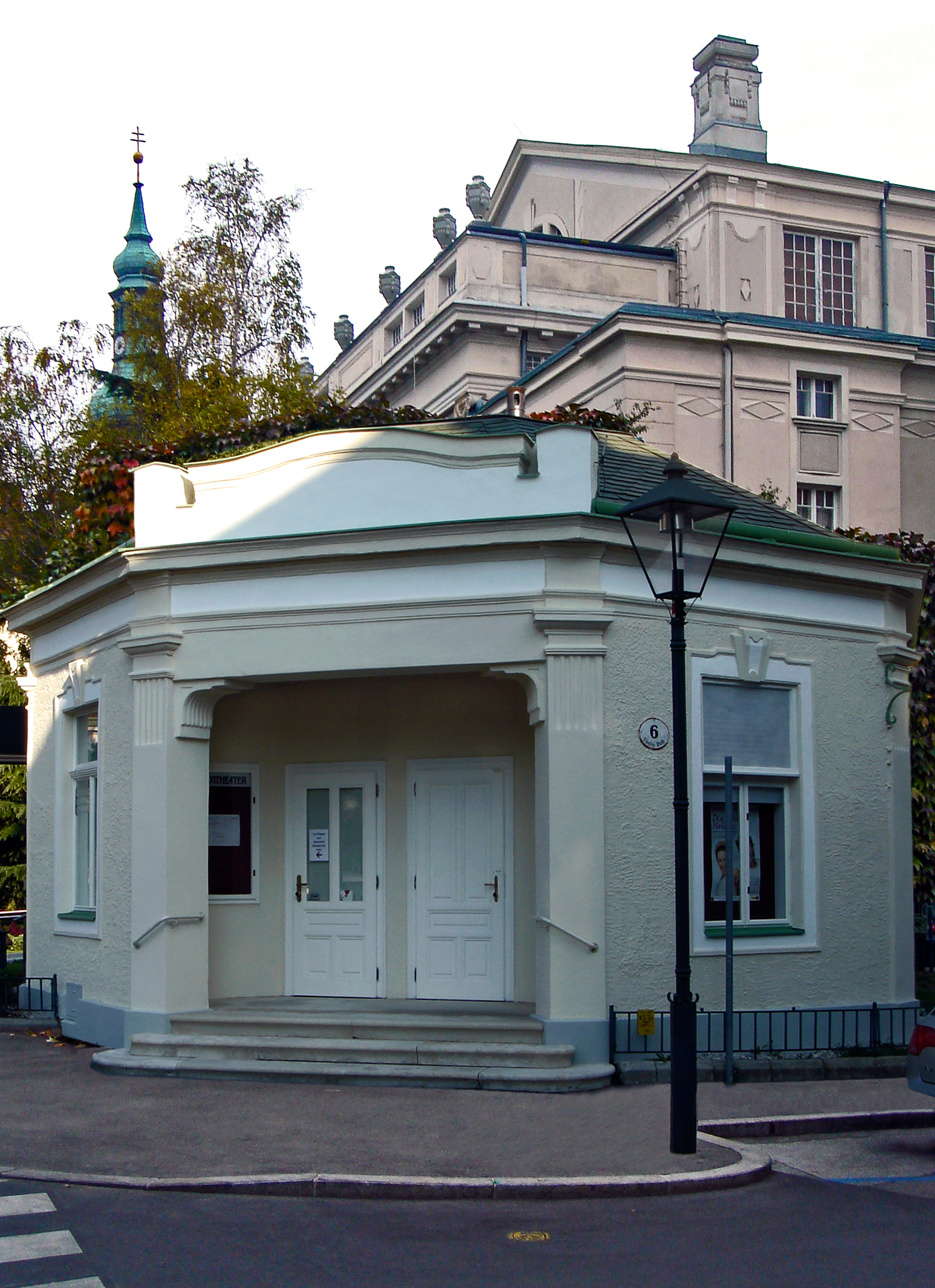 Baden bei Wien, Theaterkiosk, Theaterplatz 6 (gegenüber Kaiser-Franz-Ring 5)